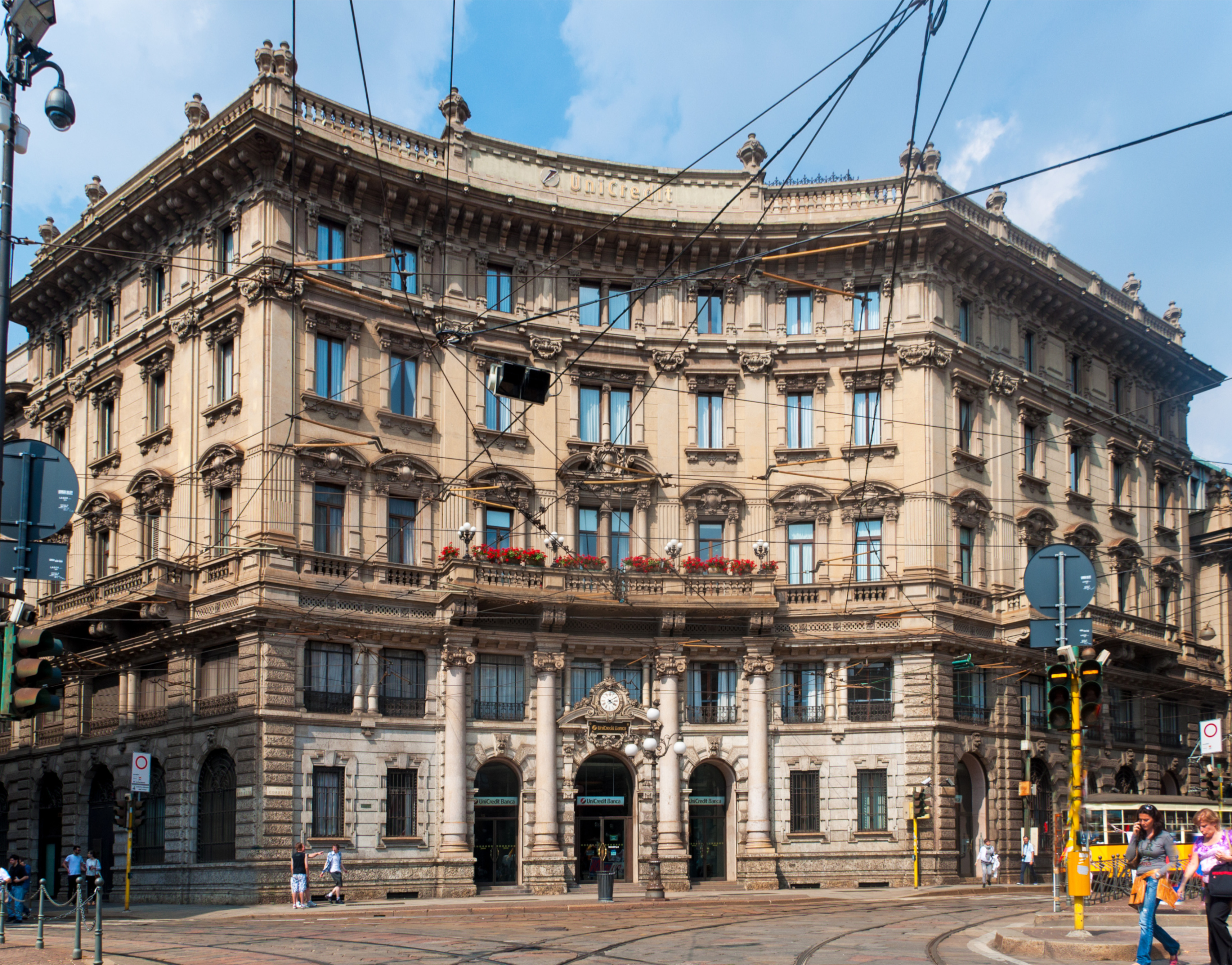 Palazzo di UniCredit (ex Credito Italiano) in Piazza Cordusio a Milano